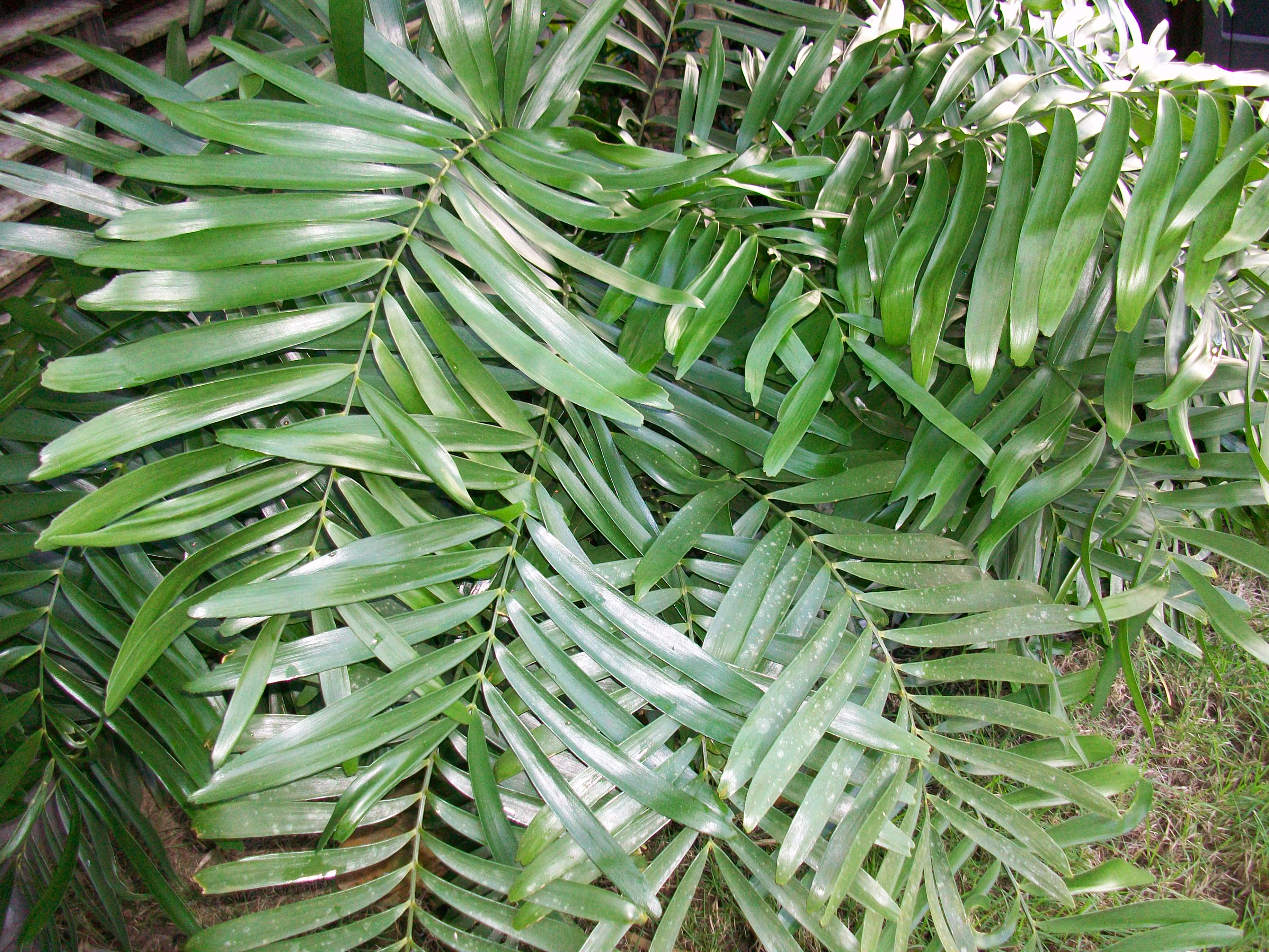 Hábito de Zamia erosa.